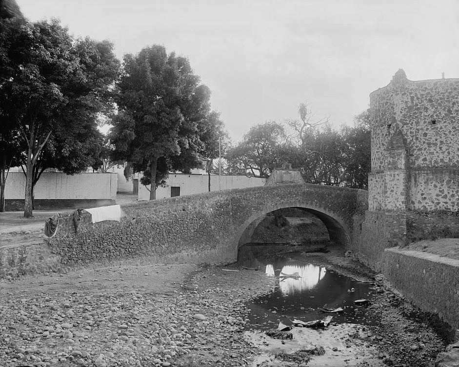 Puente de San Francisco Panzacola, el cual está ubicado en la zona cercana a los viveros de Coyoacán. La construcción a la derecha corresponde a parte posterior de la capilla de San Antonio Panzacola, y al fondo se ubica parte de la hacienda del Altillo. De aquí partían los caminos que llevaba a San Ángel, Coyoacán y Churubusco. La fotografía corresponde a la primera mitad del siglo XX y las dos primeras construcciones aún se mantienen en pie. Se encuentra en el catálogo de la Biblioteca del Congreso de los Estados Unidos con el título Old bridge on the Churubusco, aunque el nombre es erróneo, pues este es el Rio de la Magdalena, único río que se mantiene a cielo abierto en toda la ciudad de México.